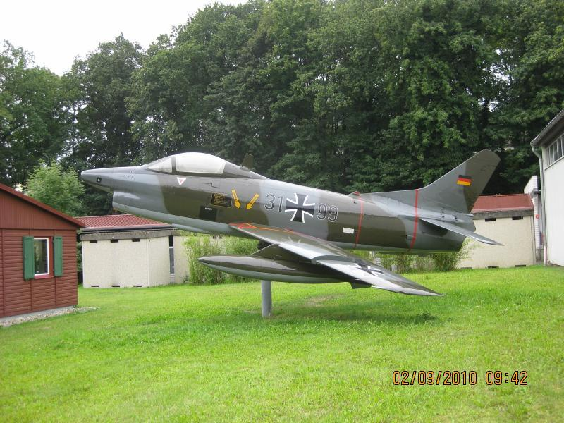 Fiat G-91 im Werksmuseum Motorenfabrik Oberursel Kennzeichnung 31+91